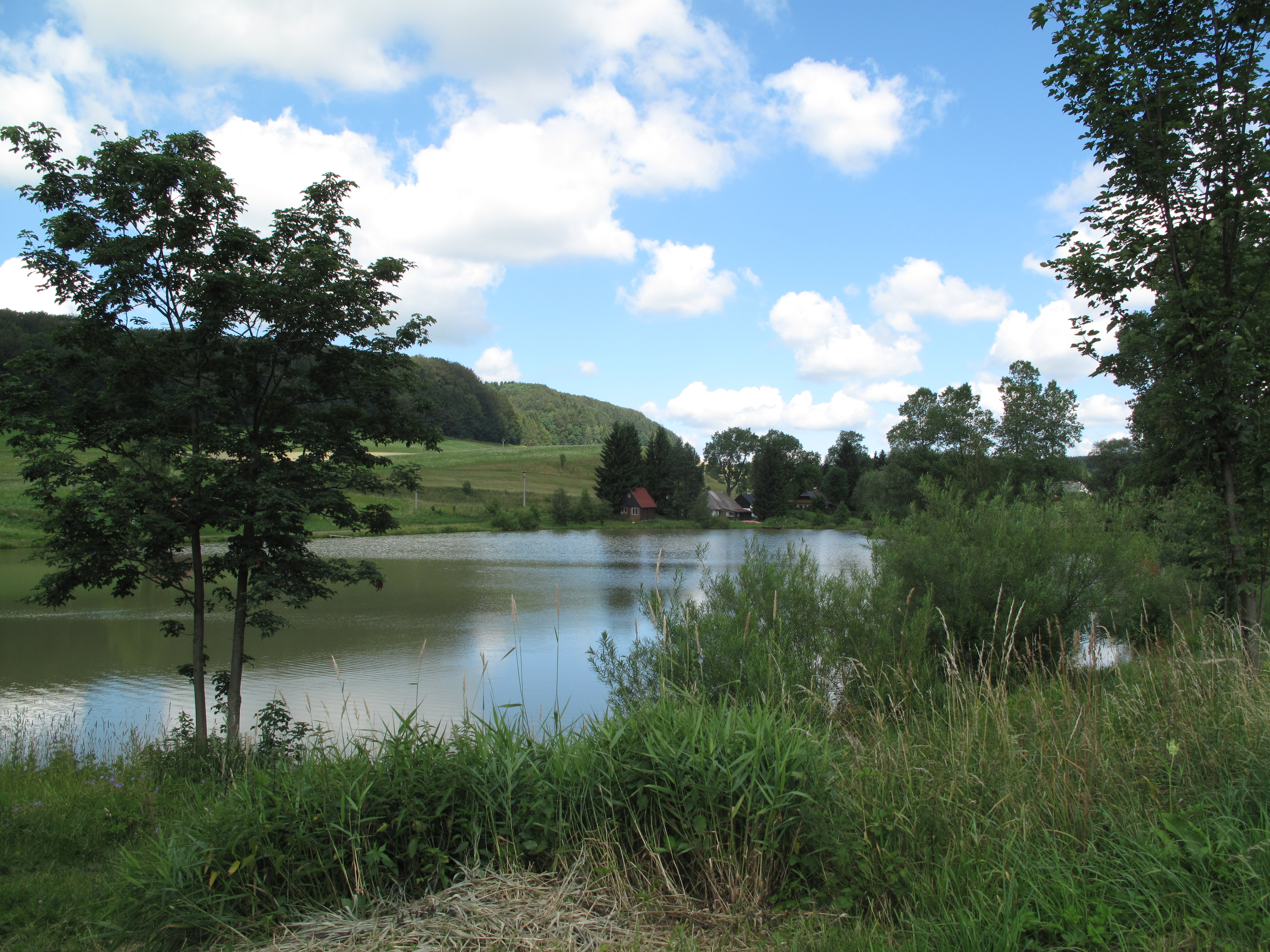 Rybník Hony, Police nad Metují